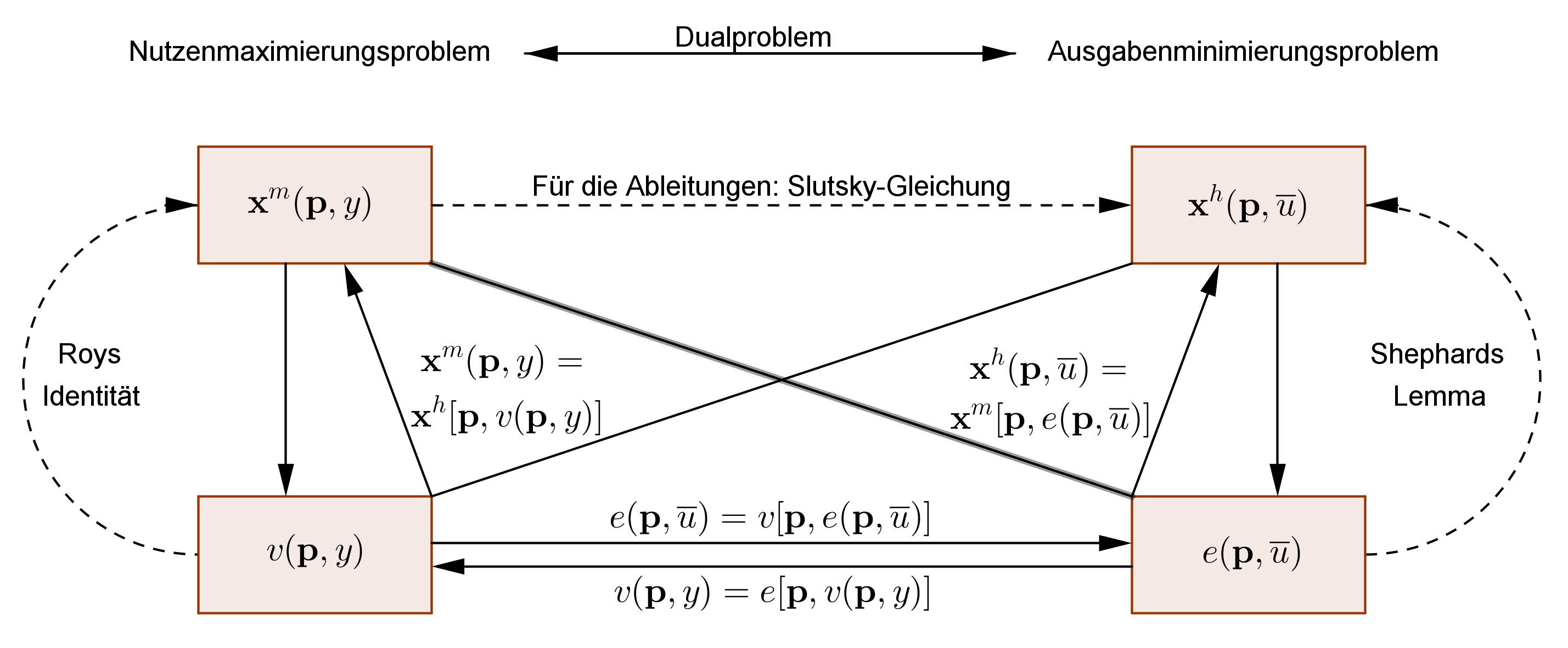 Beziehungen zwischen Nutzenmaximierungs- und Ausgabenminimierungsproblem